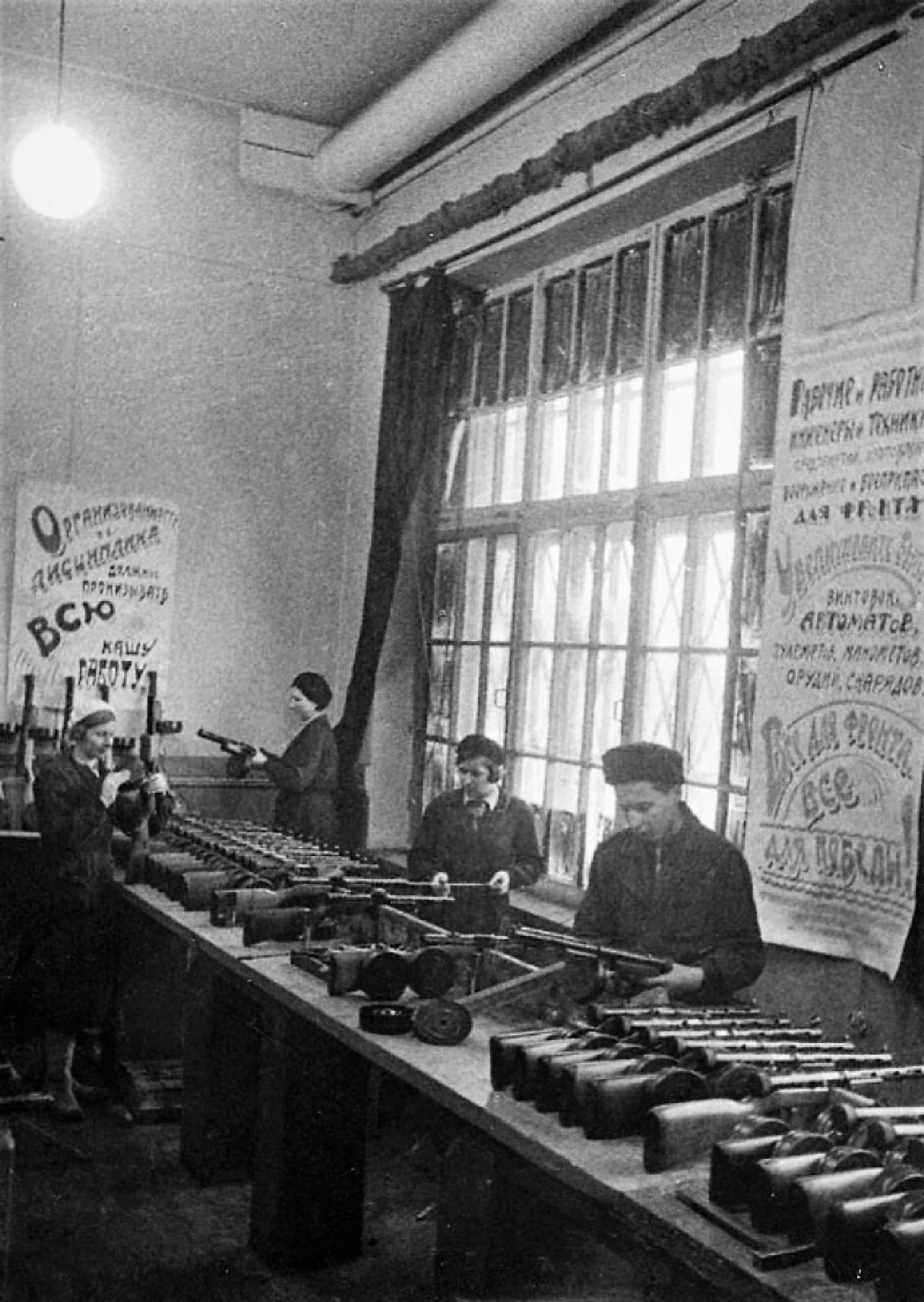 Рабочие ленинградского участка завода имени С.П. Воскова собирают пистолеты-пулемёты Дегтярева. Во время блокады цеха завода размещались в корпусах эвакуированного завода "Красный инструментальщик", затем в помещениях "Ленэнерго"